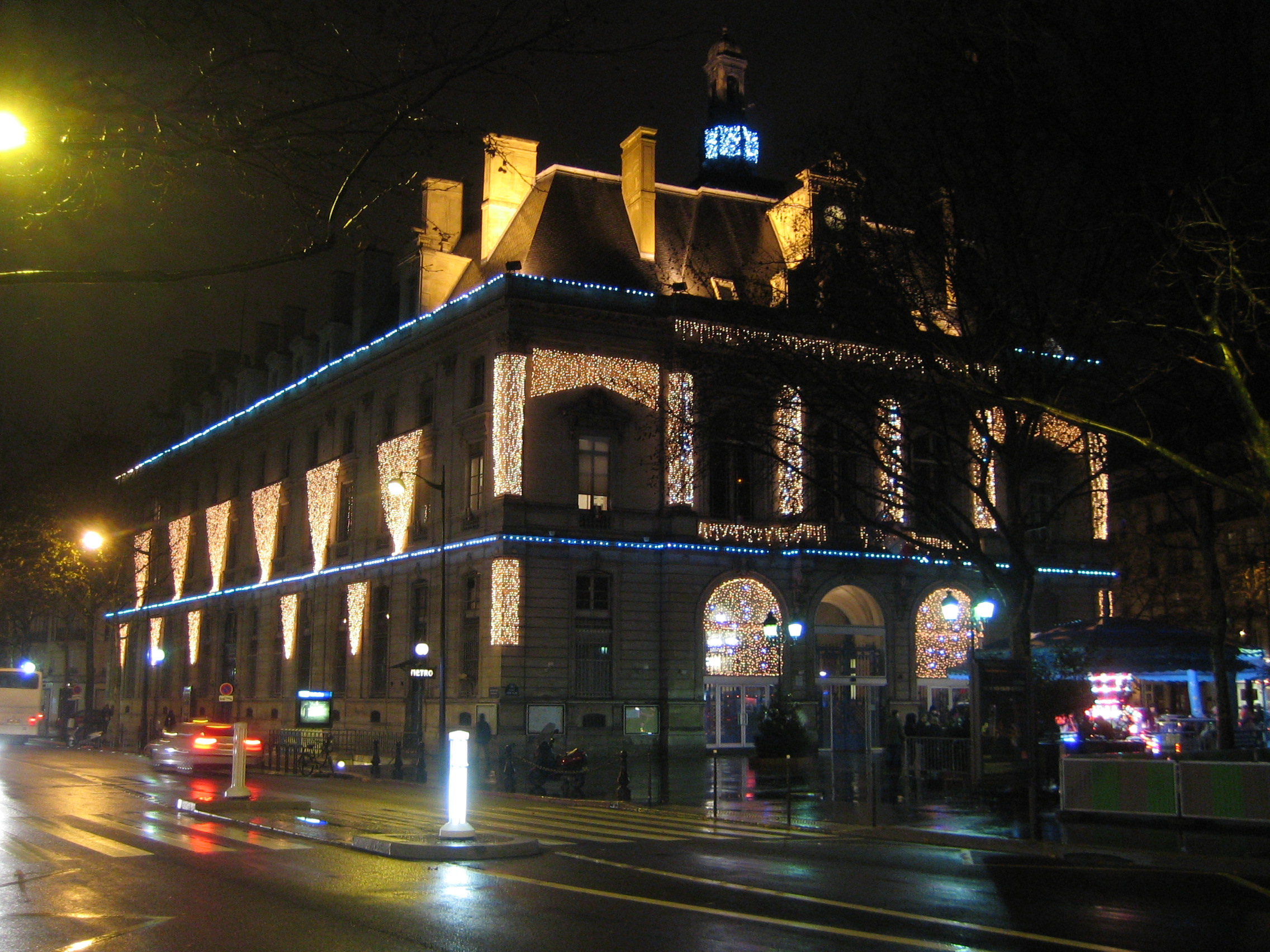 Hôtel de ville du 11e arrondissement de Paris, la nuit, l'hiver.